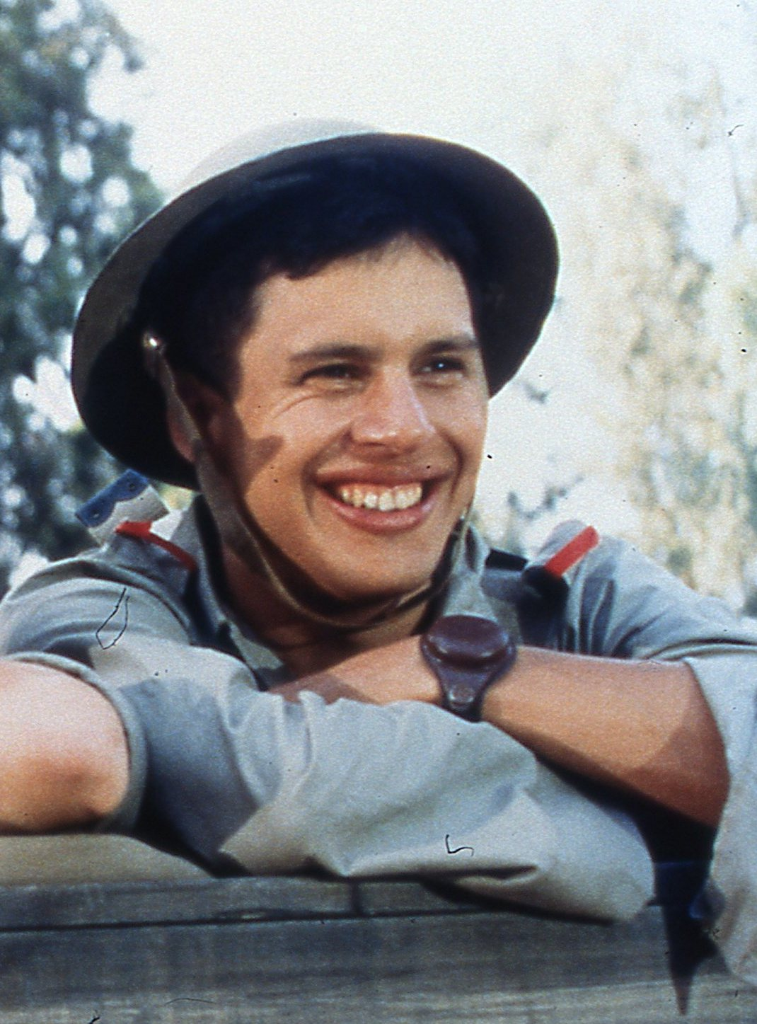 אסקימו לימון